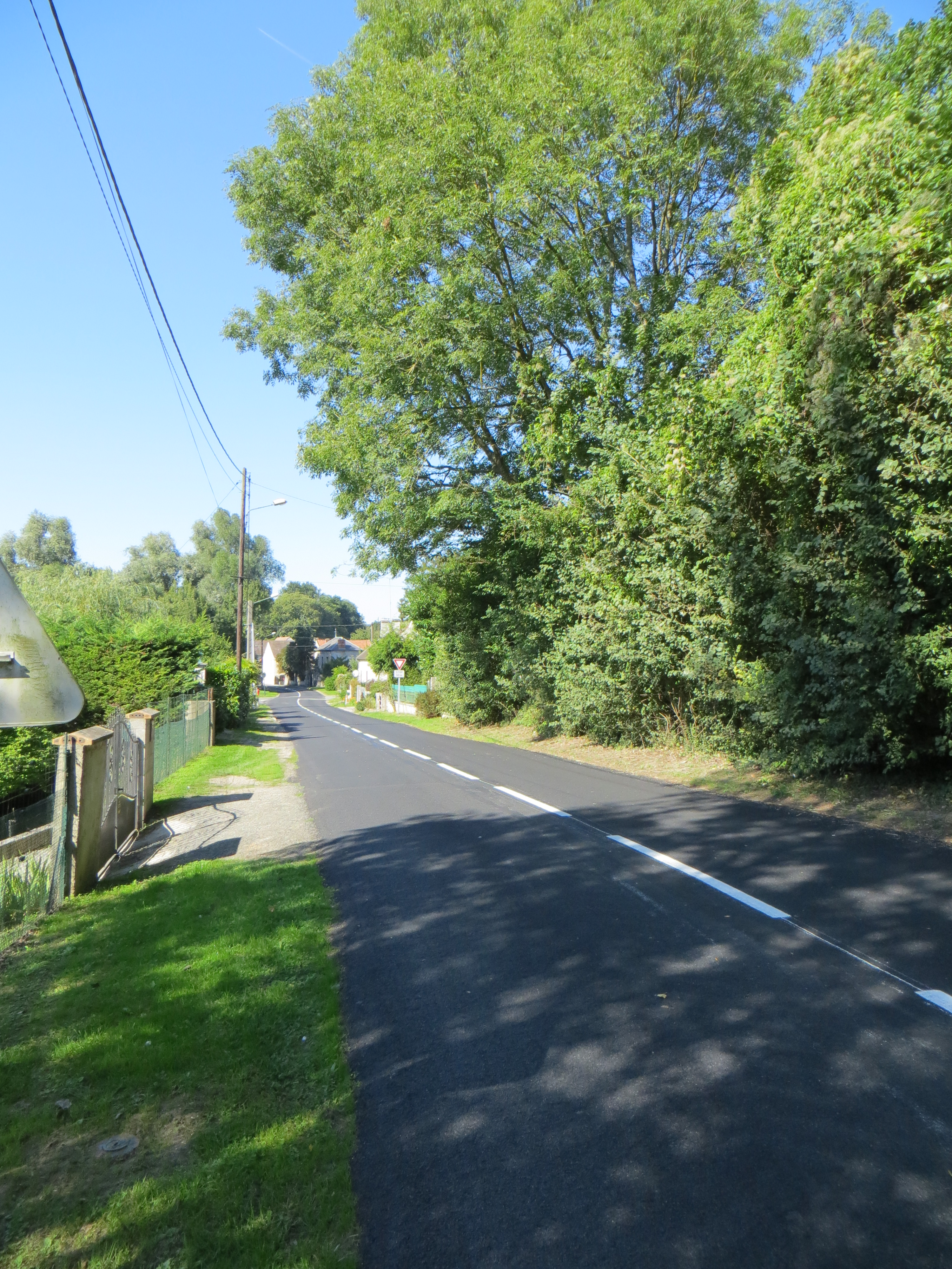 Vue de l'entrée du bourg par le chemin de Mortefontaine (D19)